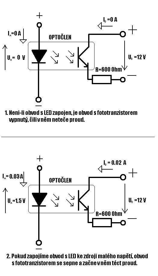 Zapojení optočlenu do obvodu